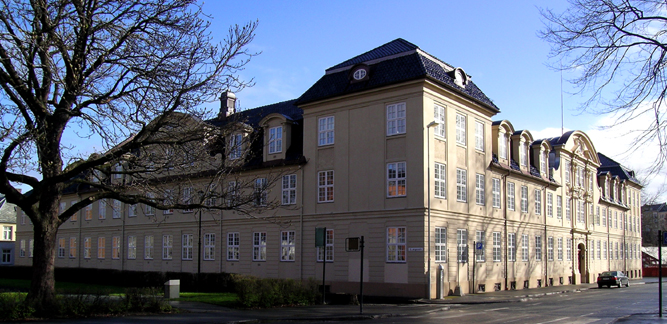 Thomas Angells hus, Bispegata 2-4, Trondheim. Bygd. 1772; arkitekt Johan Chr. Neumann. På- og ombygd 1904; arkitekt Axel Guldahl d.e.